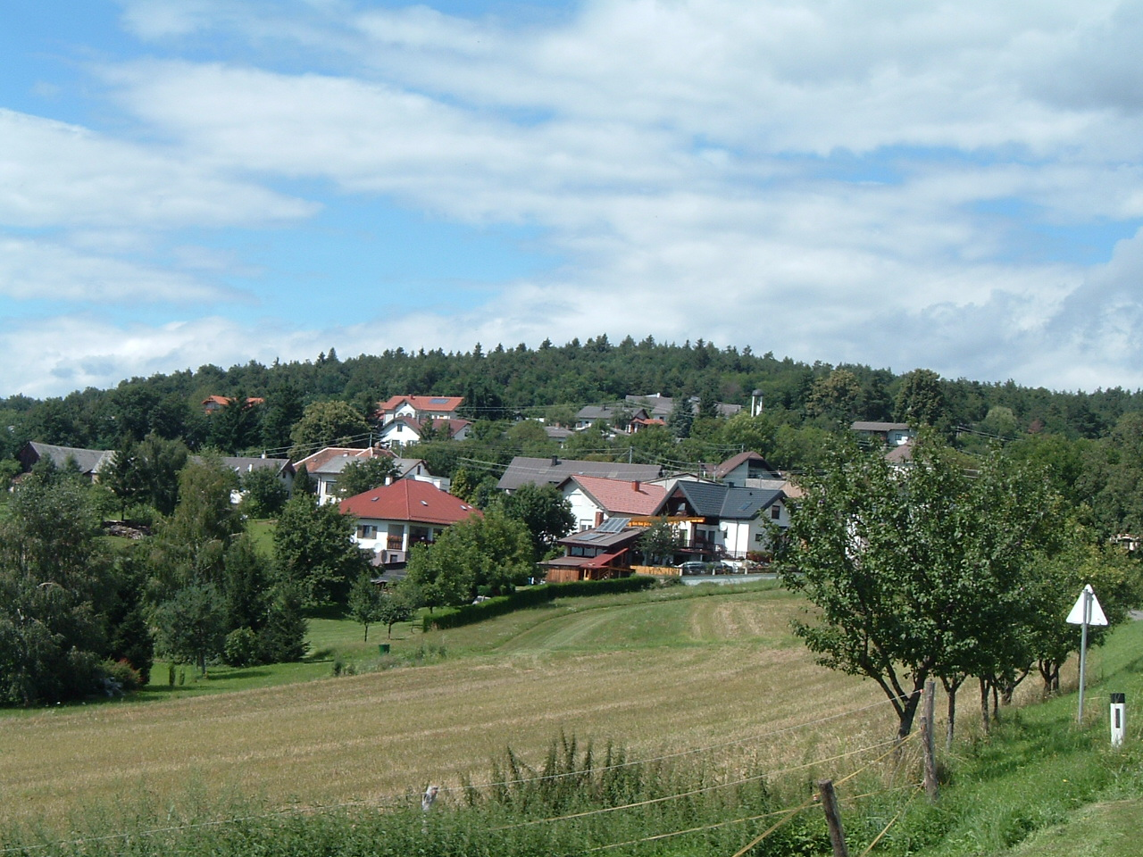 Oberpodgoria, Burgenland, Austria